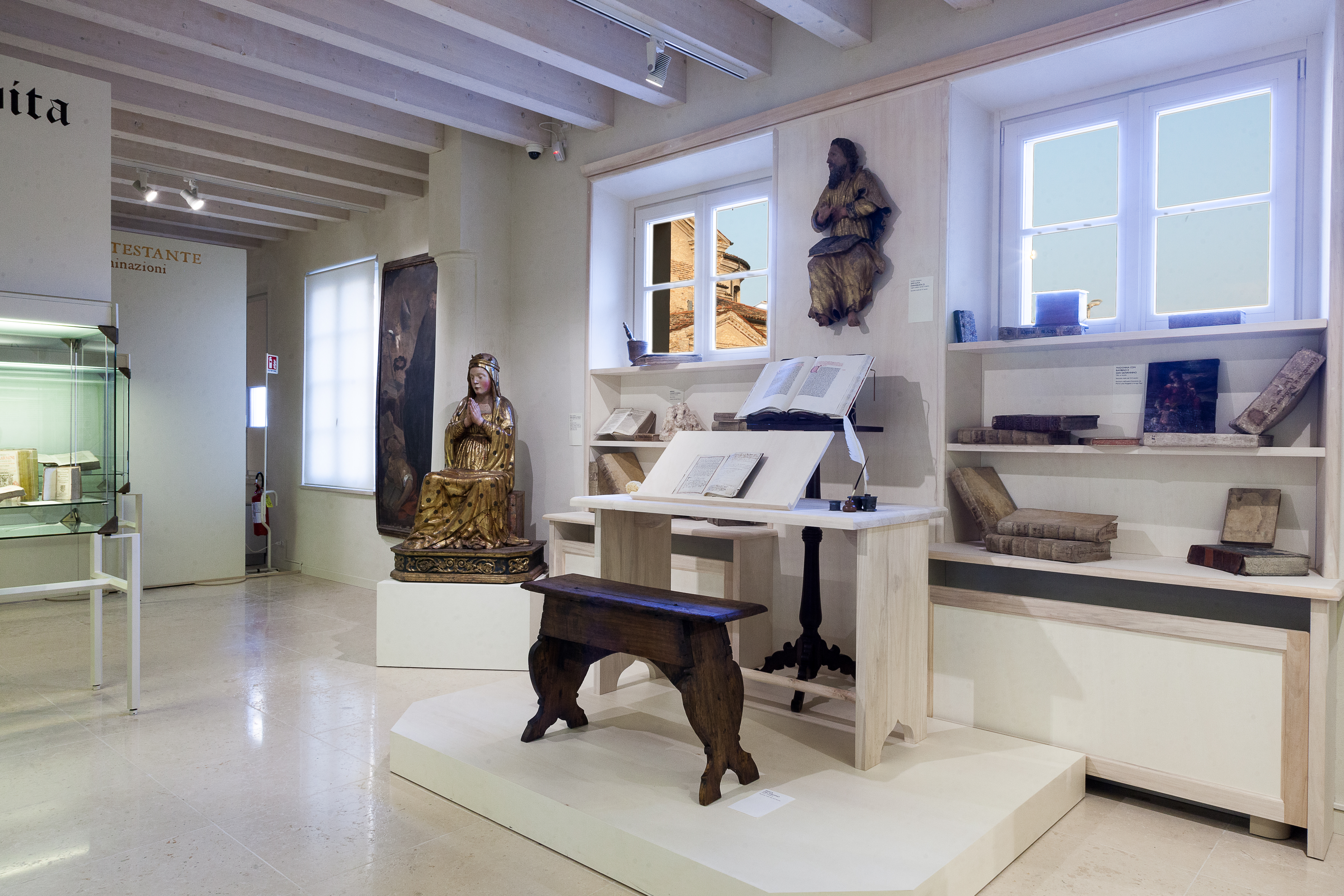 MAST Castel Goffredo-La città erudita